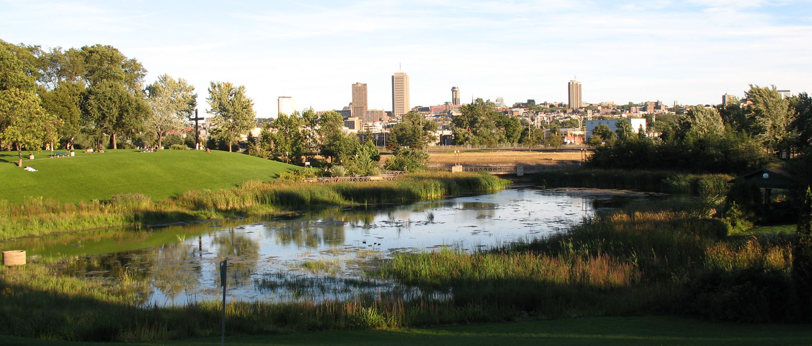 Québec, Parc Cartier-Brébeuf